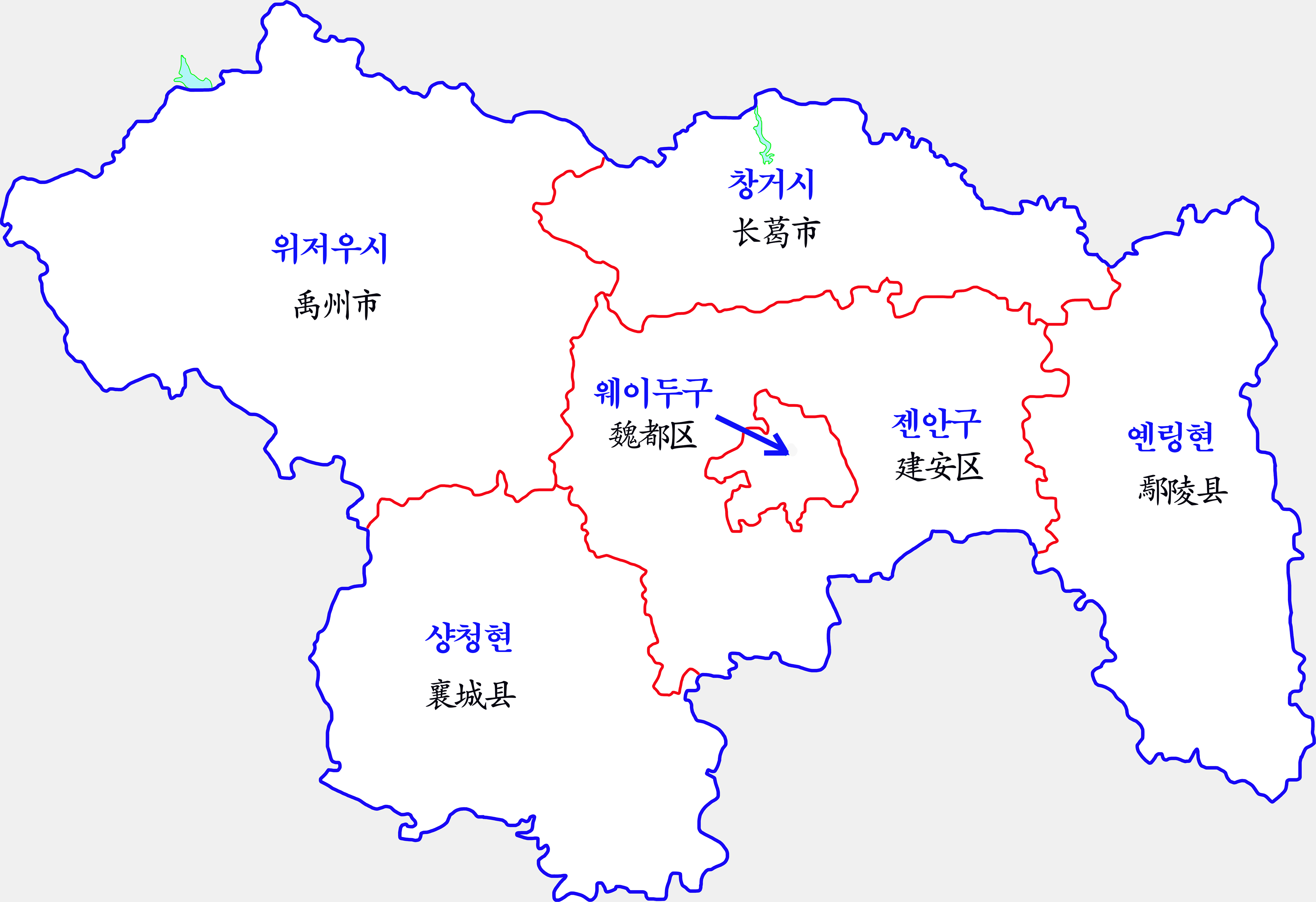 쉬창시 현급구역도